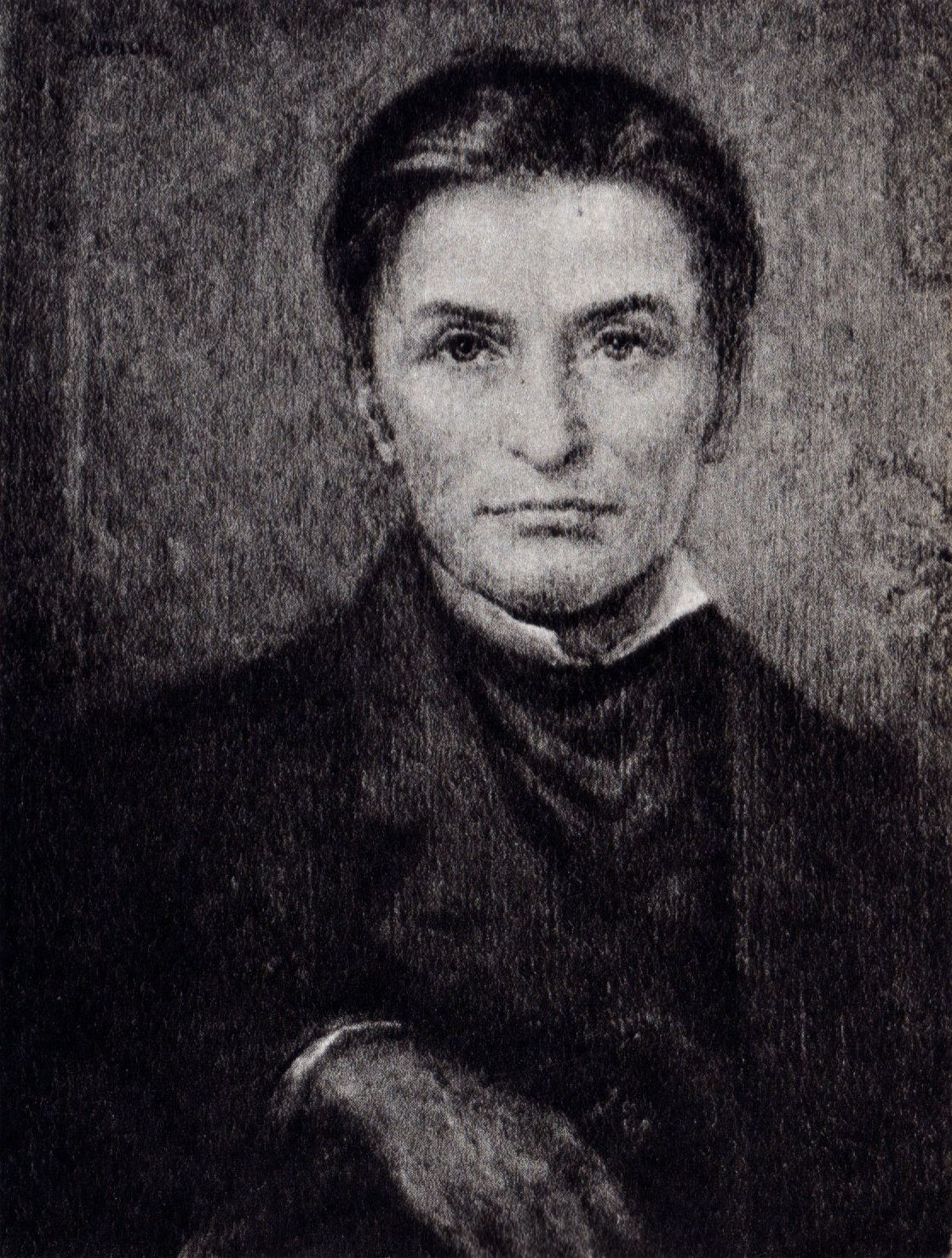 Franciszek Armiński, astronom